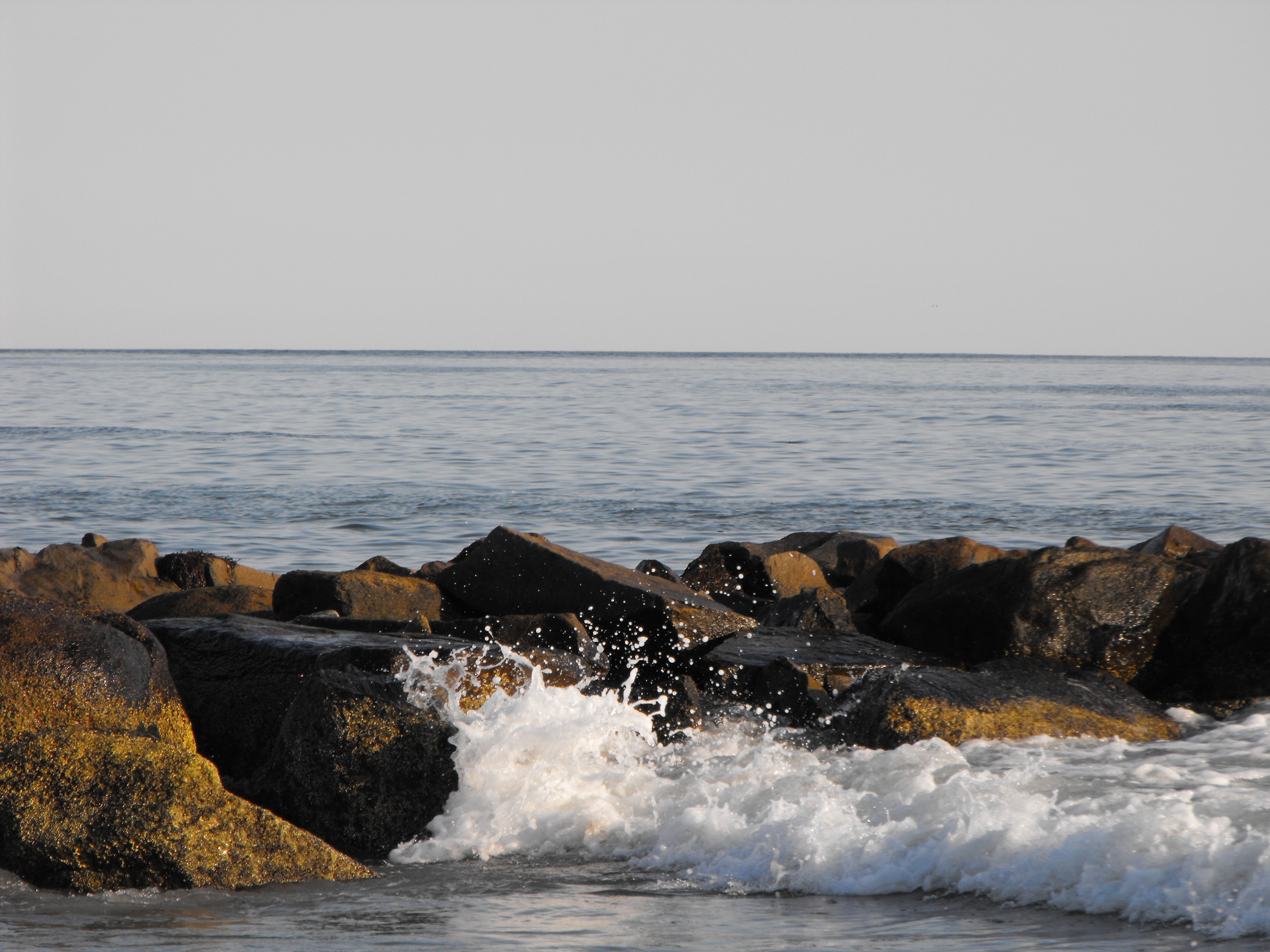 Narragansett Bay